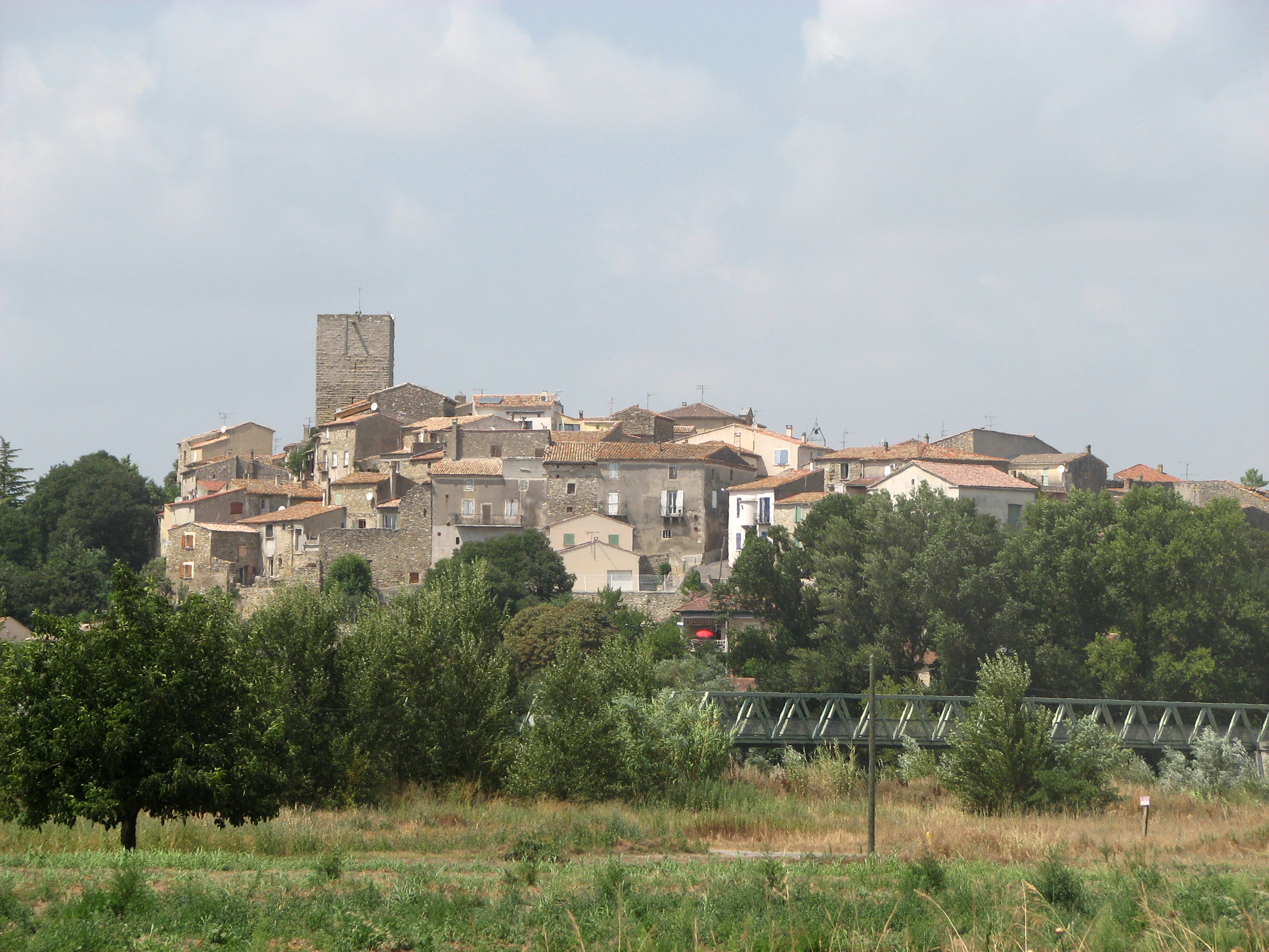 Village de Moussac (Gard)